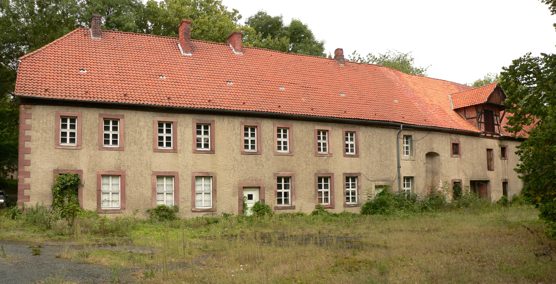 Gesindehaus von Schloss Wrisbergholzen am Tag des offenen Denkmals 2011